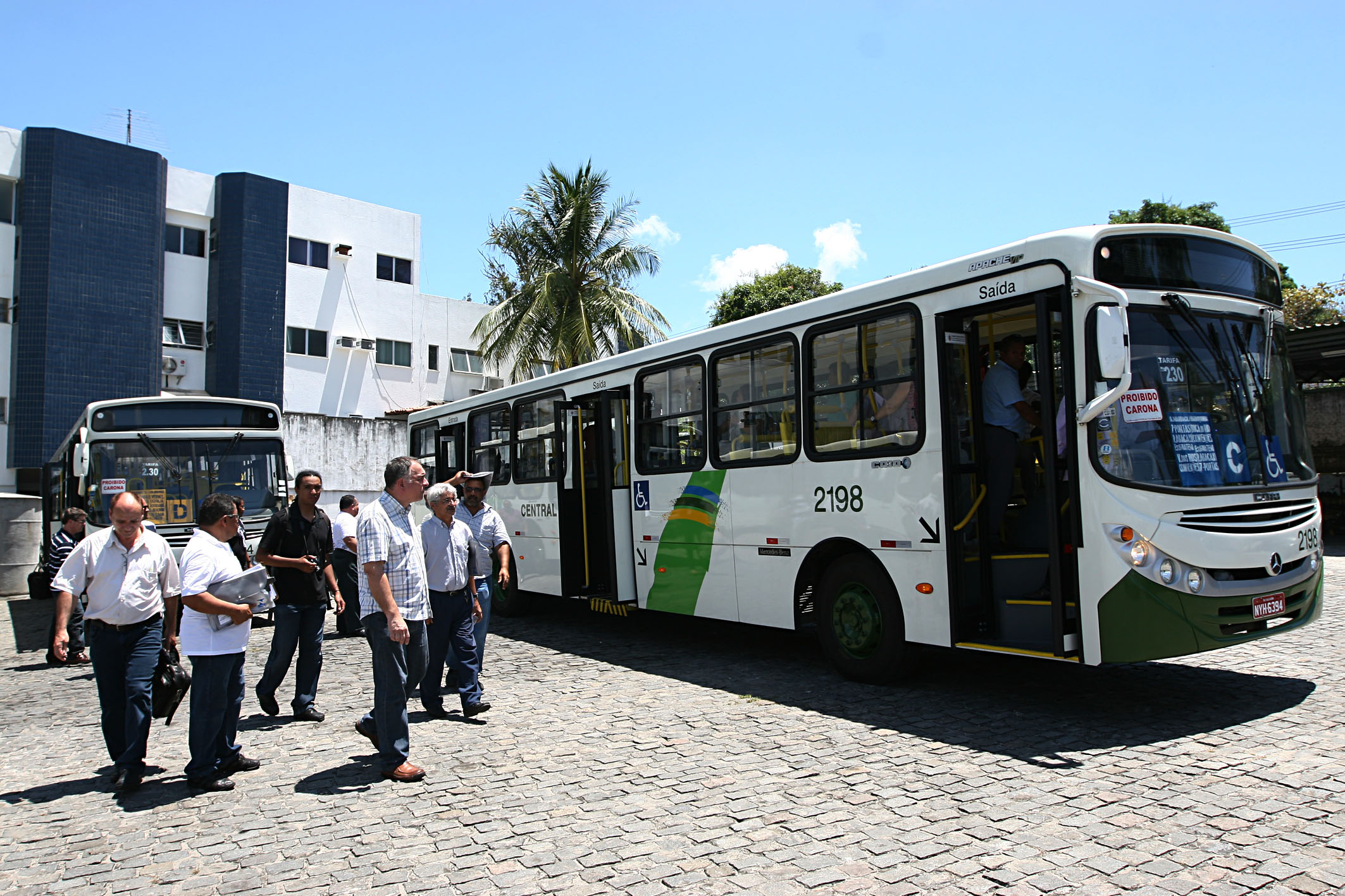 Ônibus da Central no dia em que o Inmetro verificou a acessibilidade no transporte coletivo de Salvador.